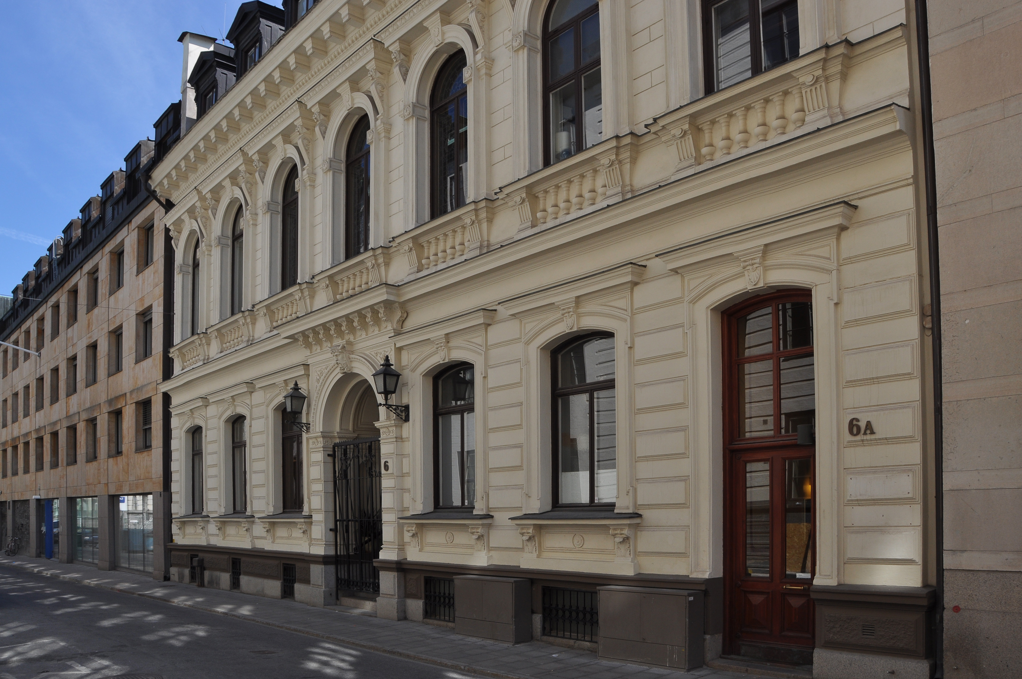 Nya Sällskapets lokaler. Västra Trädgårdsgatan 6, Stockholm. Byggnadsår 1882-83, arkitekt Axel Hjalmar Kumlien, byggherre AB Nya Casino, byggmästare J P Schonberg